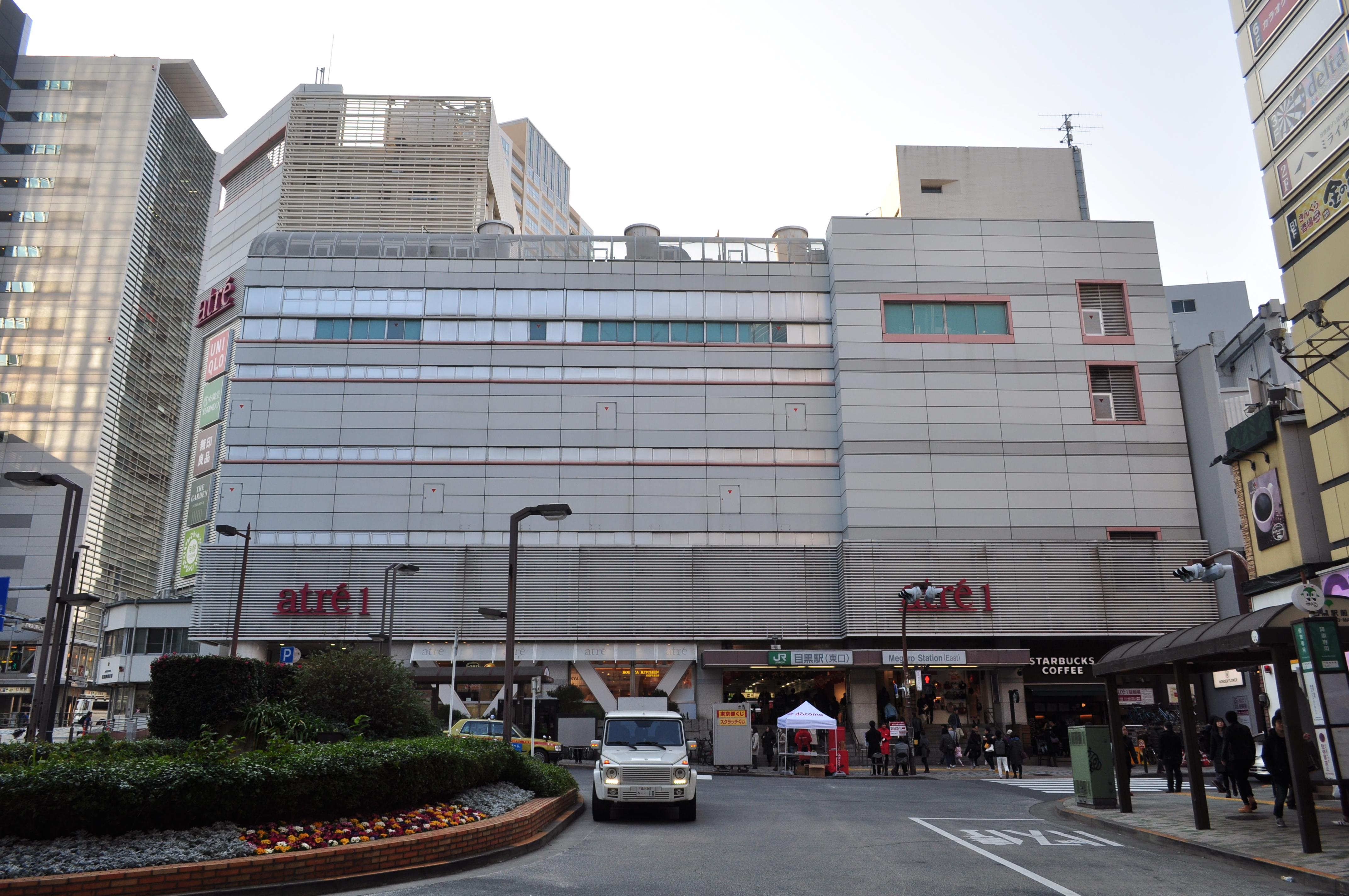 目黒駅 東口